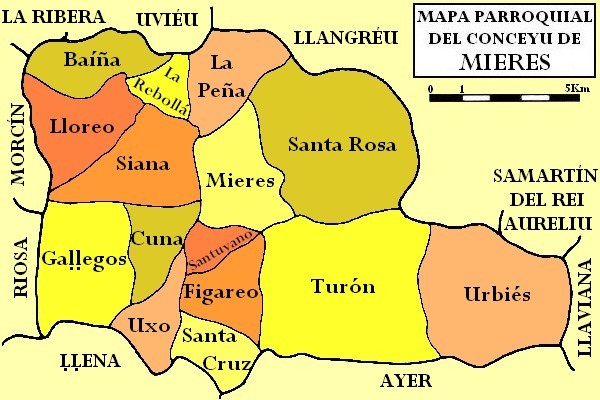 Mapa parroquial del conceyu de Mieres, dixebráu por colores.